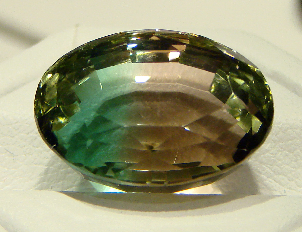 Tourmaline bicolore taillée.